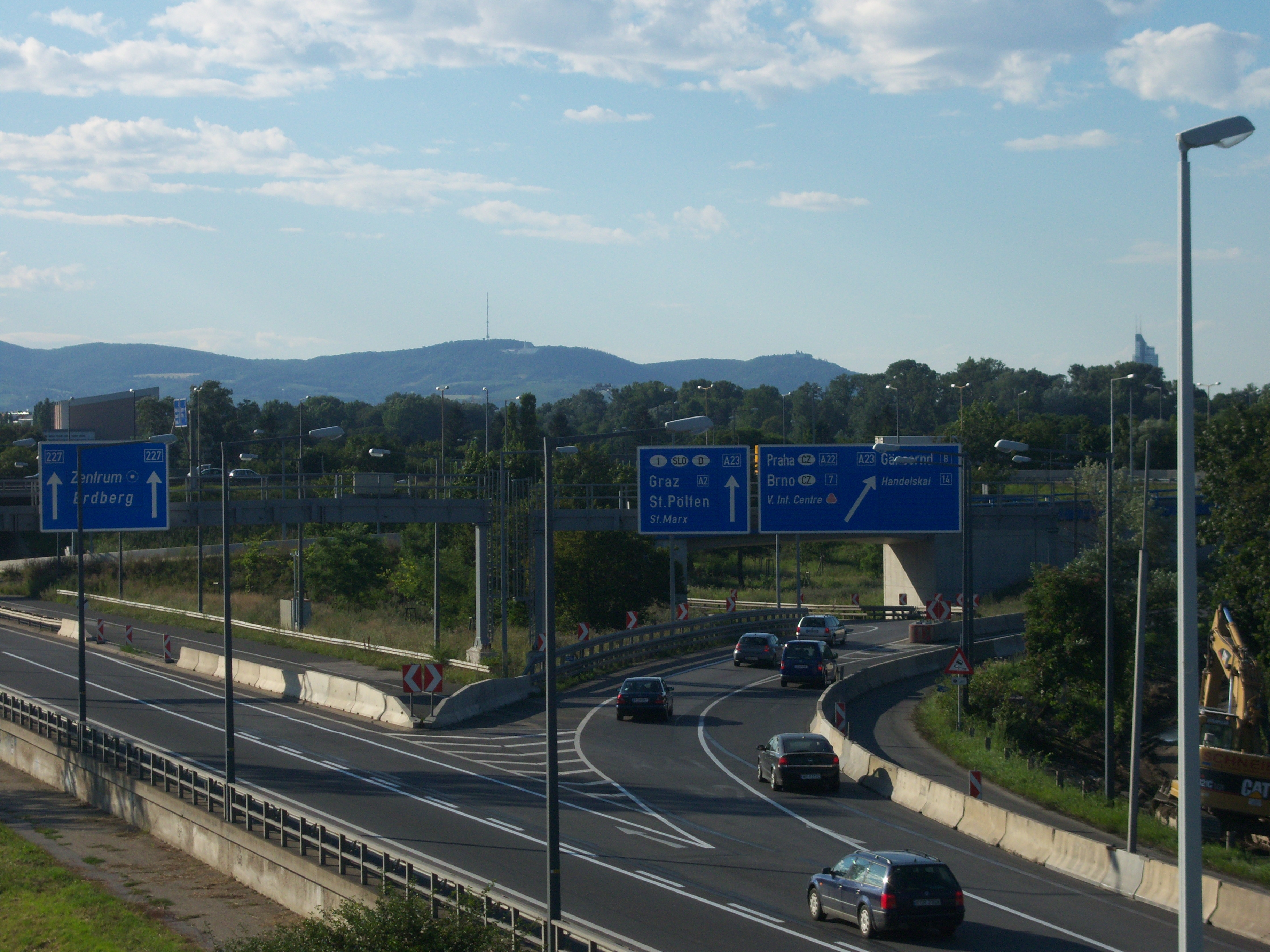 A4 Ost Autobahn kurz vorm Knoten Prater